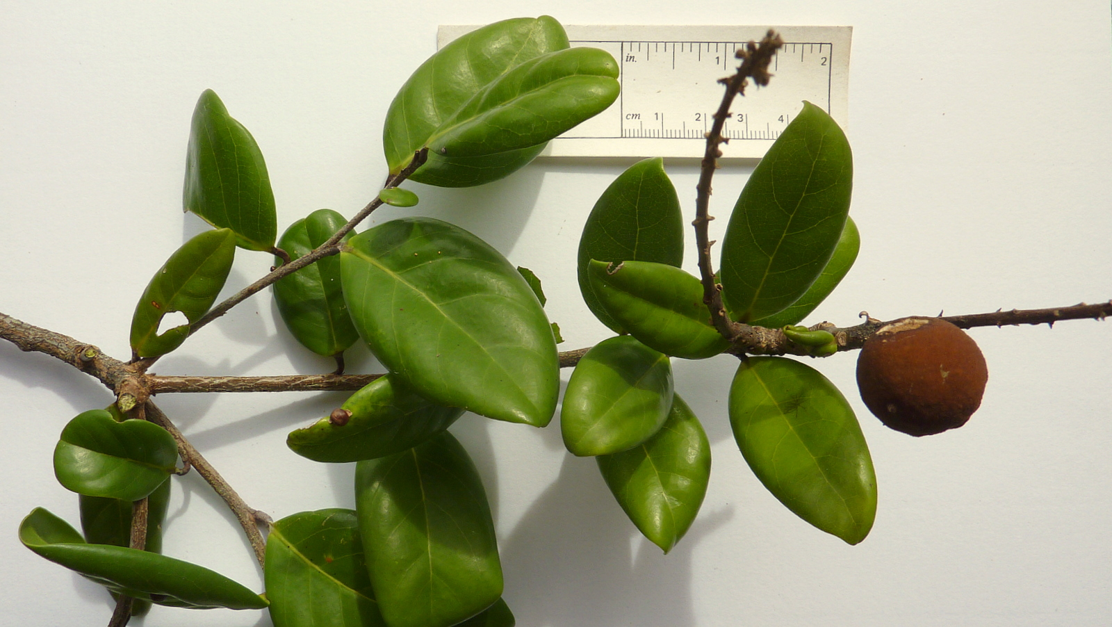 Popovkin 716 (HUEFS)